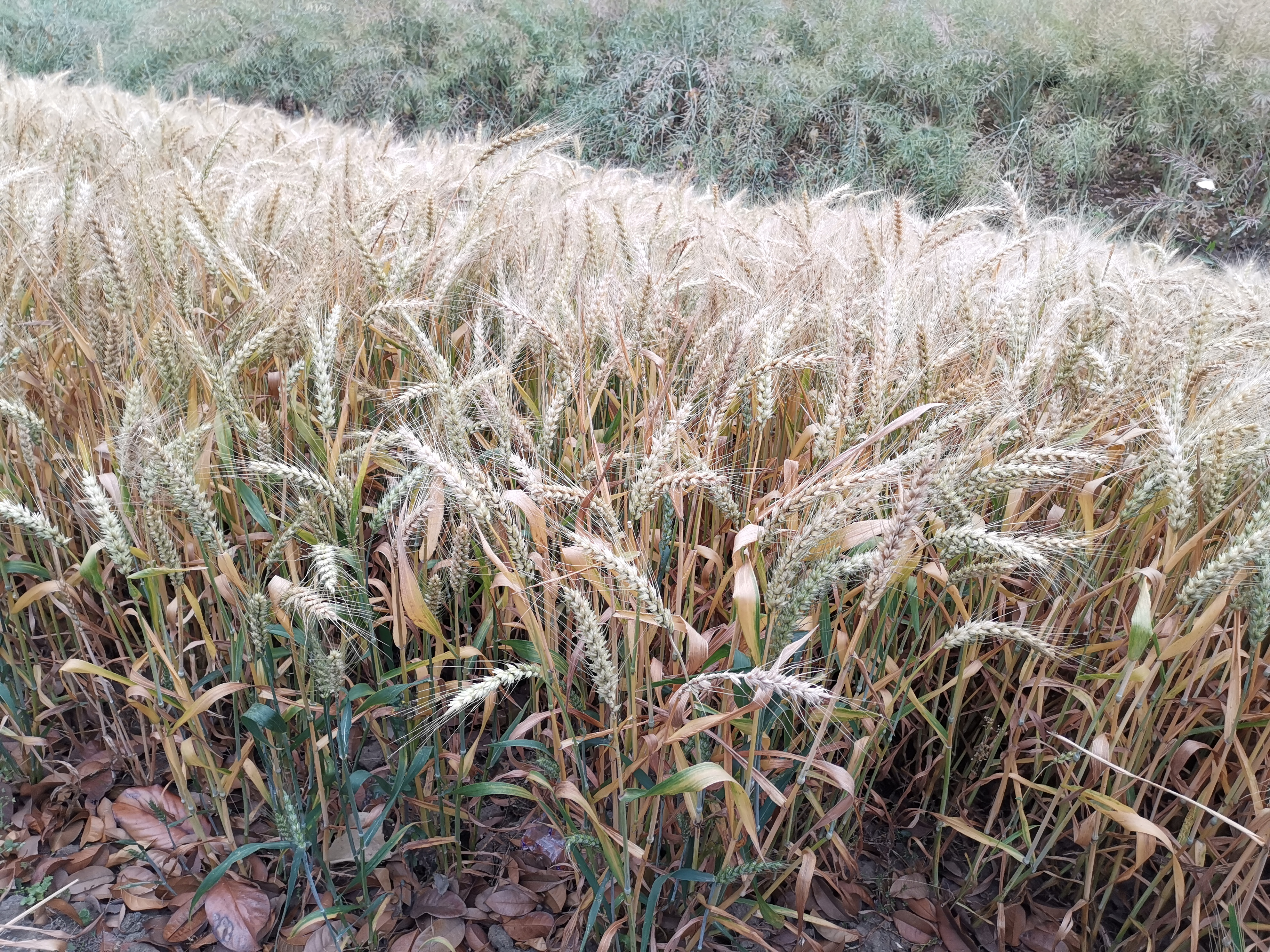 常州武进麦田